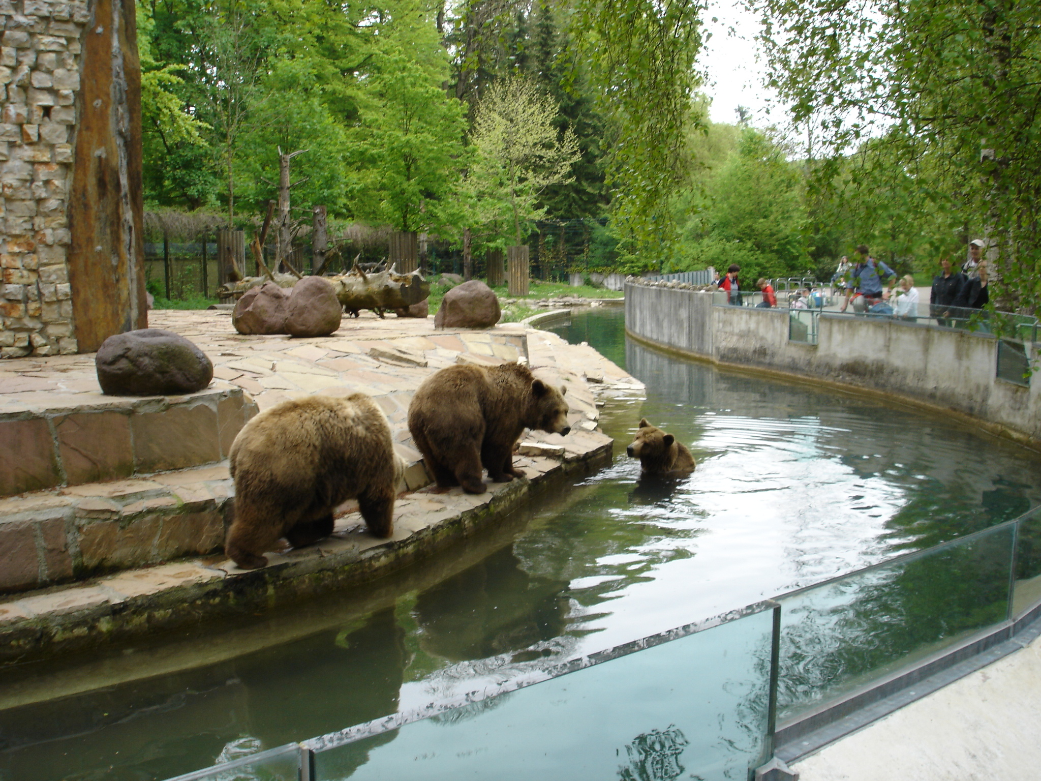 Neue Bärenanlage im Zoo Augsburg